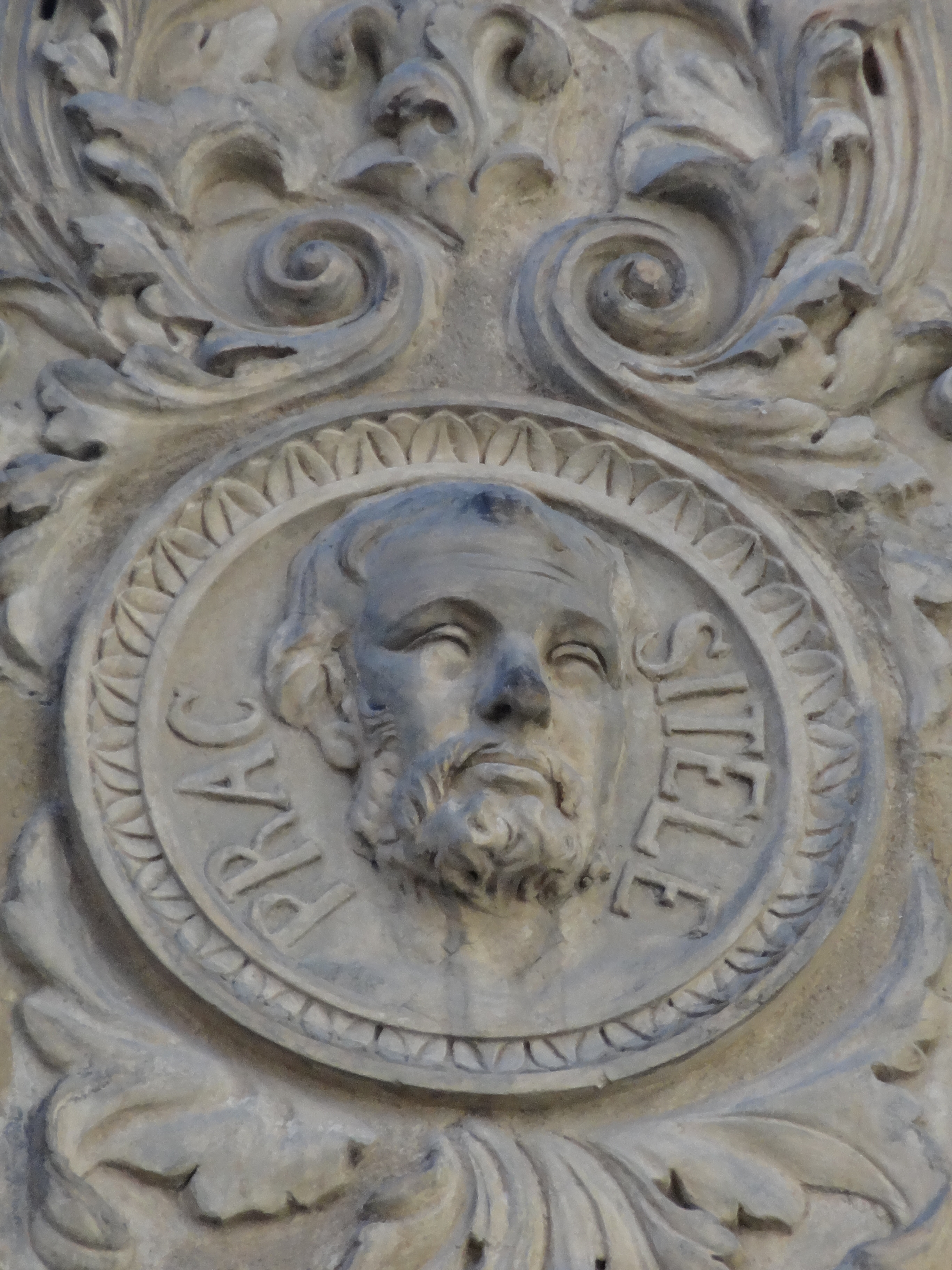 Medalló amb Praxíteles (escrit Pracsiteles)- Edifici d'habitatges c. Tallers, 45 (Barcelona)